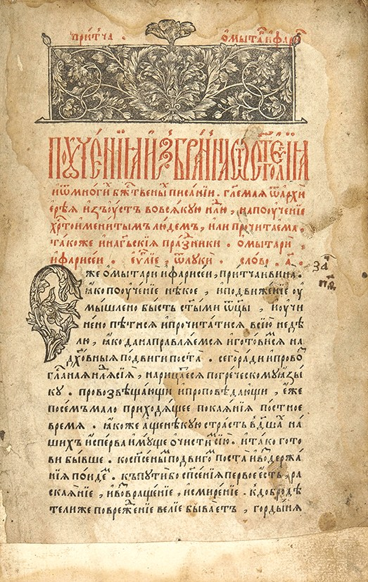 Беларуская (тарашкевіца): Эвангельле Вучыцельнае (Evangielle Vučycielnaje)